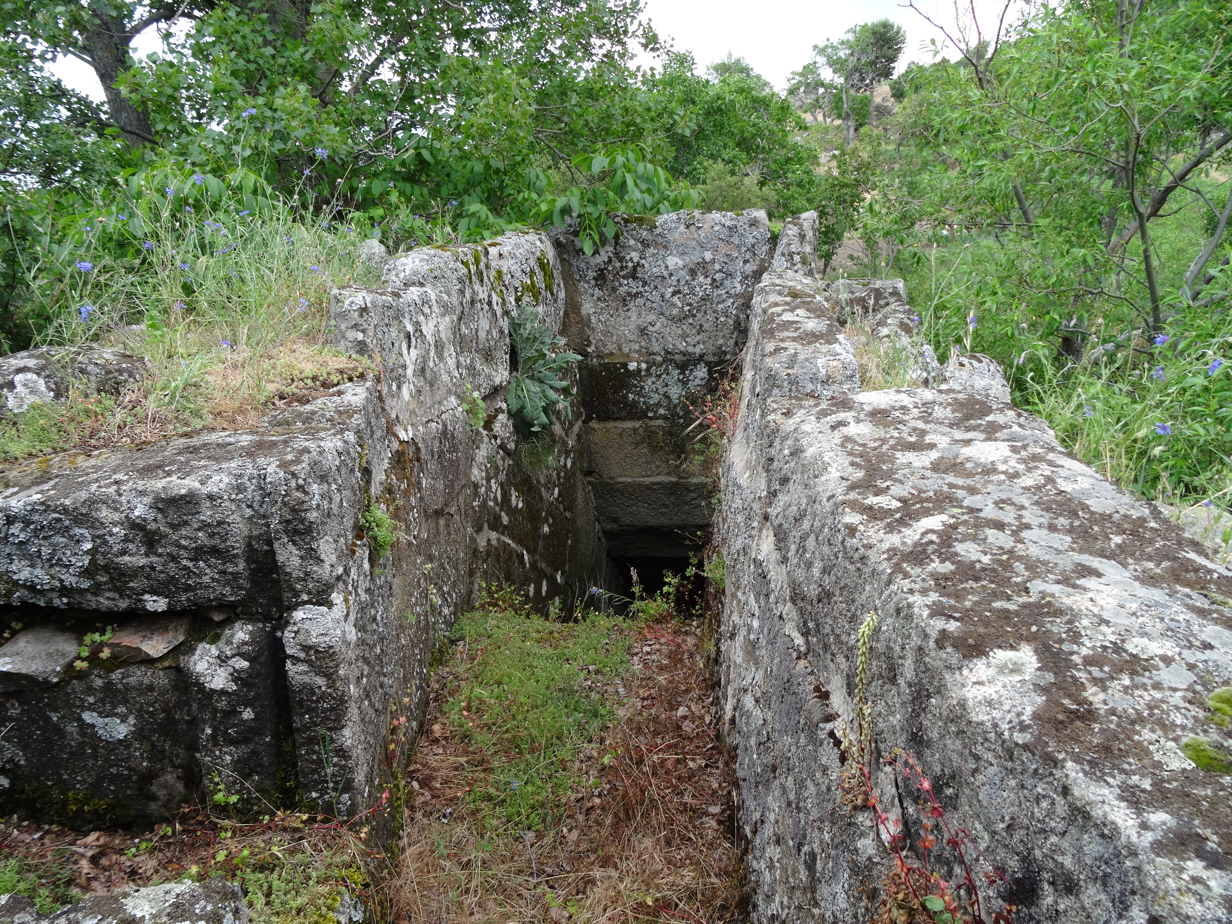 Canal o Caz y bajada del agua hacia los saetines o saetillos para posteriormente impactar en el rodezno y que el árbol de trasmisión o "Palón" mueva la muela superior o "Volandera". Molino Bajero del Río de Santa María en Navalmoral (Ávila)